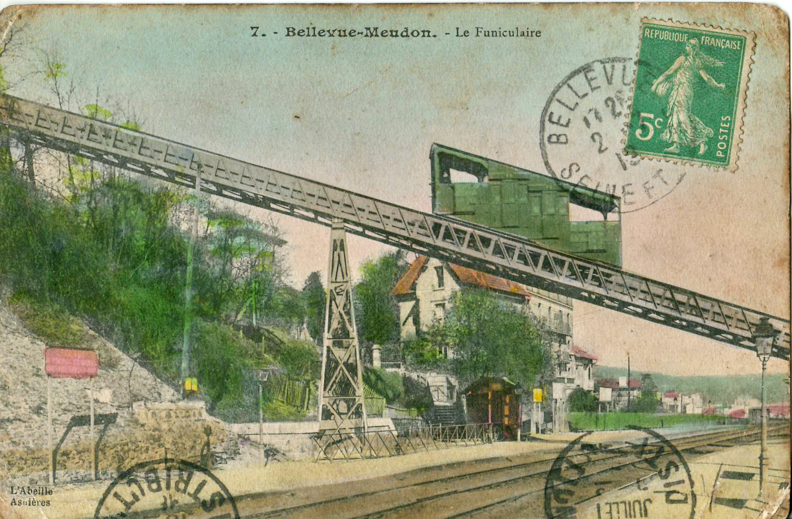 Carte postale ancienne éditée par Abeille à Asnières, n°7 : BELLEVUE-MEUDON - Le Funiculaire (couleur)